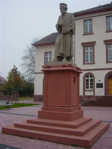 Peter Schöffer Denkmal in Gernsheim am Rhein. Renoviert anlässlich des Schöfferjahrs 2003.